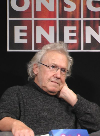 Ulrik Gräs